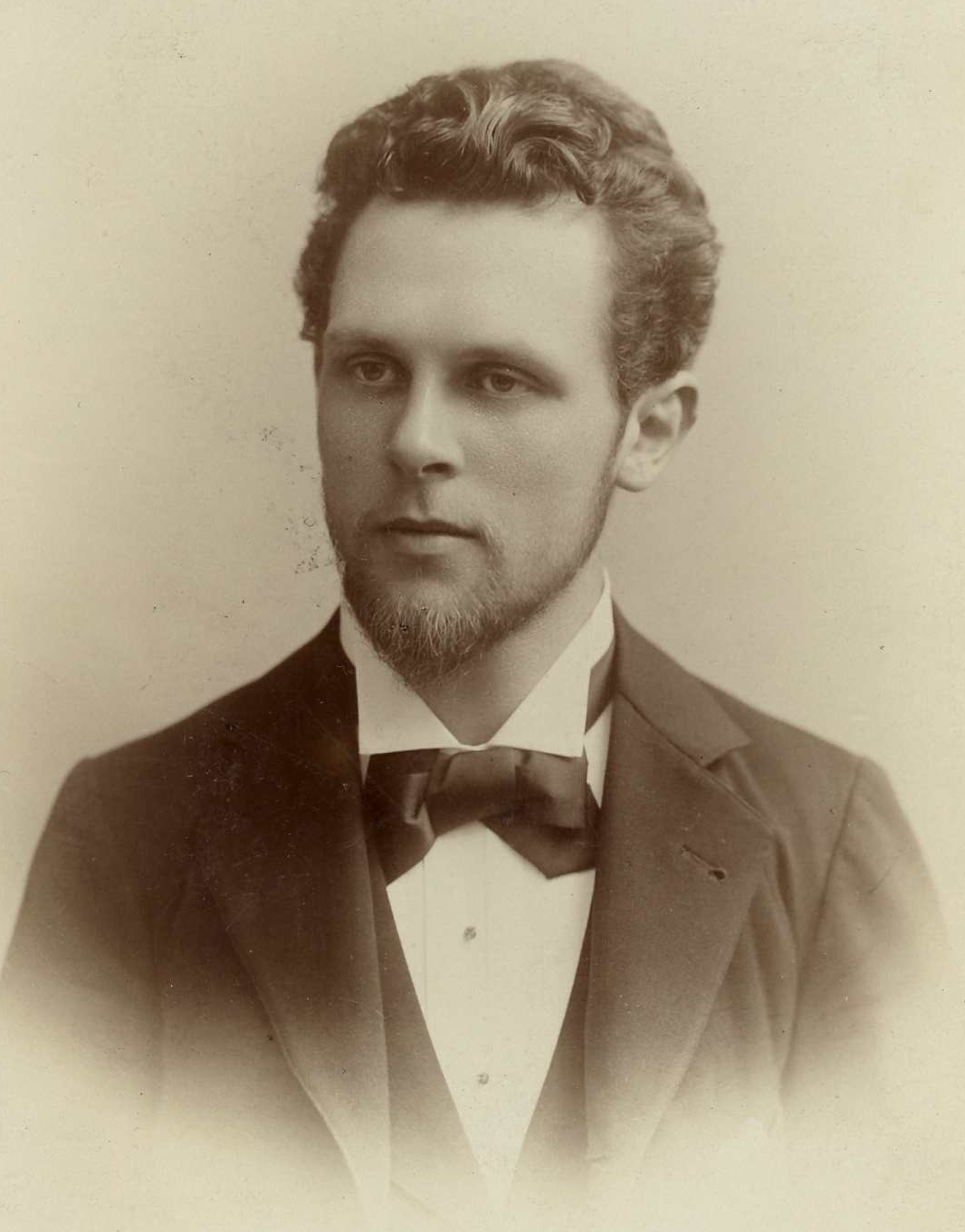 Photographie de Joseph Jongen (recadré)